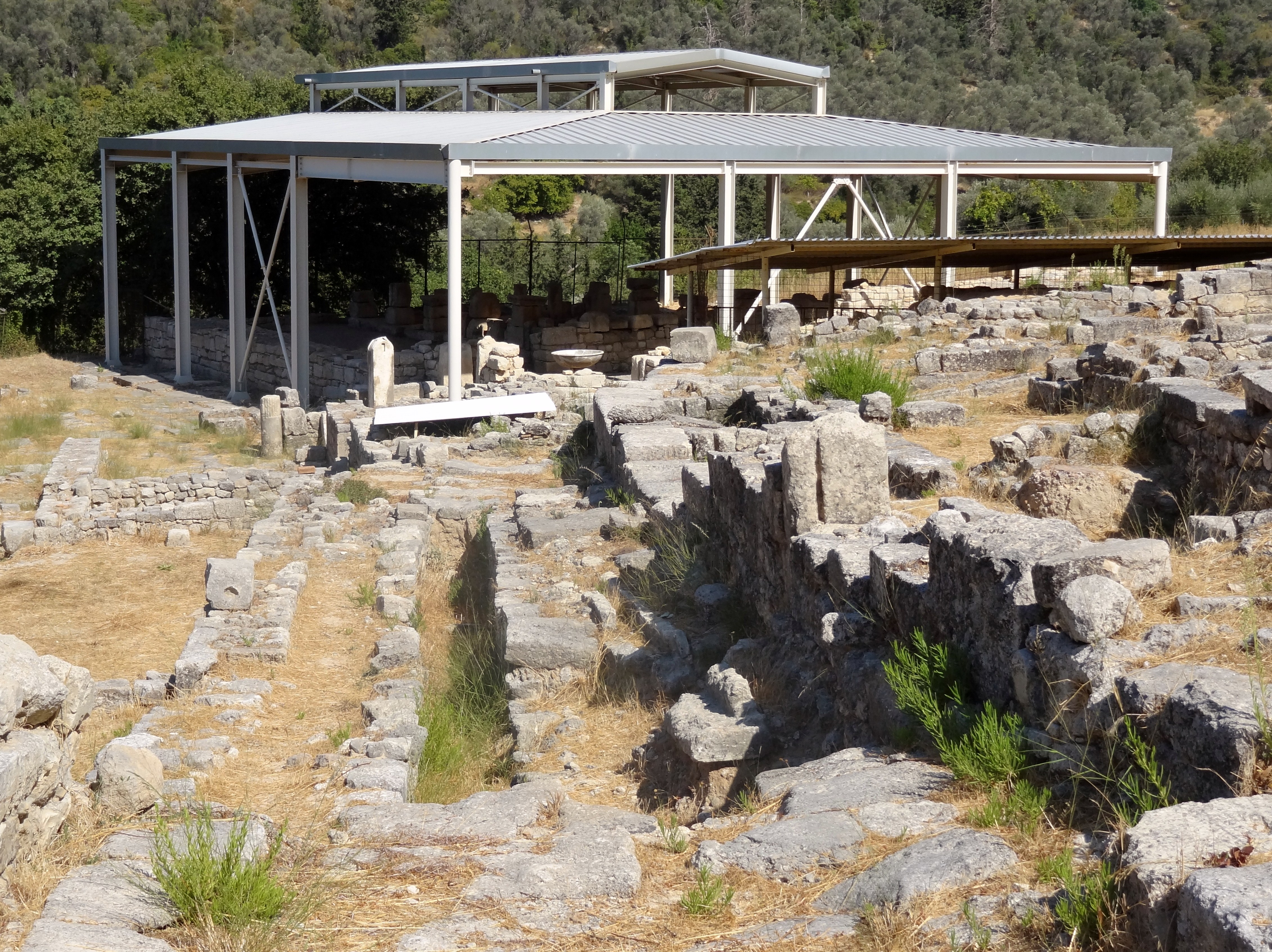 Ausgrabungsstätte von Eleutherna (Ἐλευθέρνα), Gemeinde Rethymno, Regionalbezirk Rethymno, Kreta, Griechenland